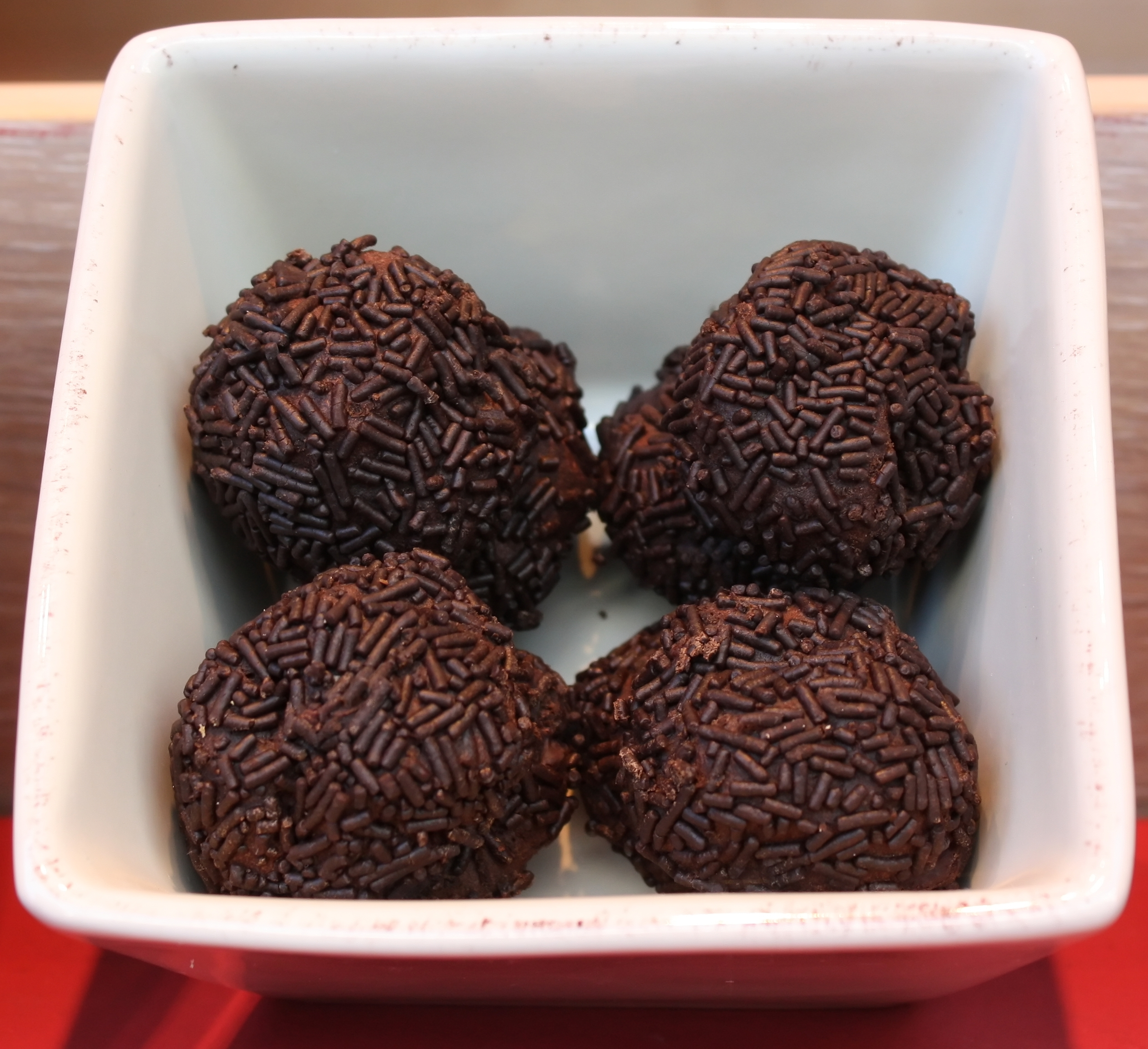 Truffes Delacre en vitrine de leur magasin de la Place de la Vieille Halle aux Blés, Bruxelles.